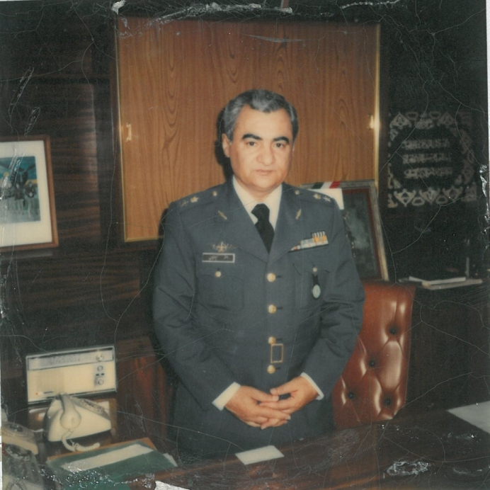 سرتیپ اصغر ایمانیان- 1355